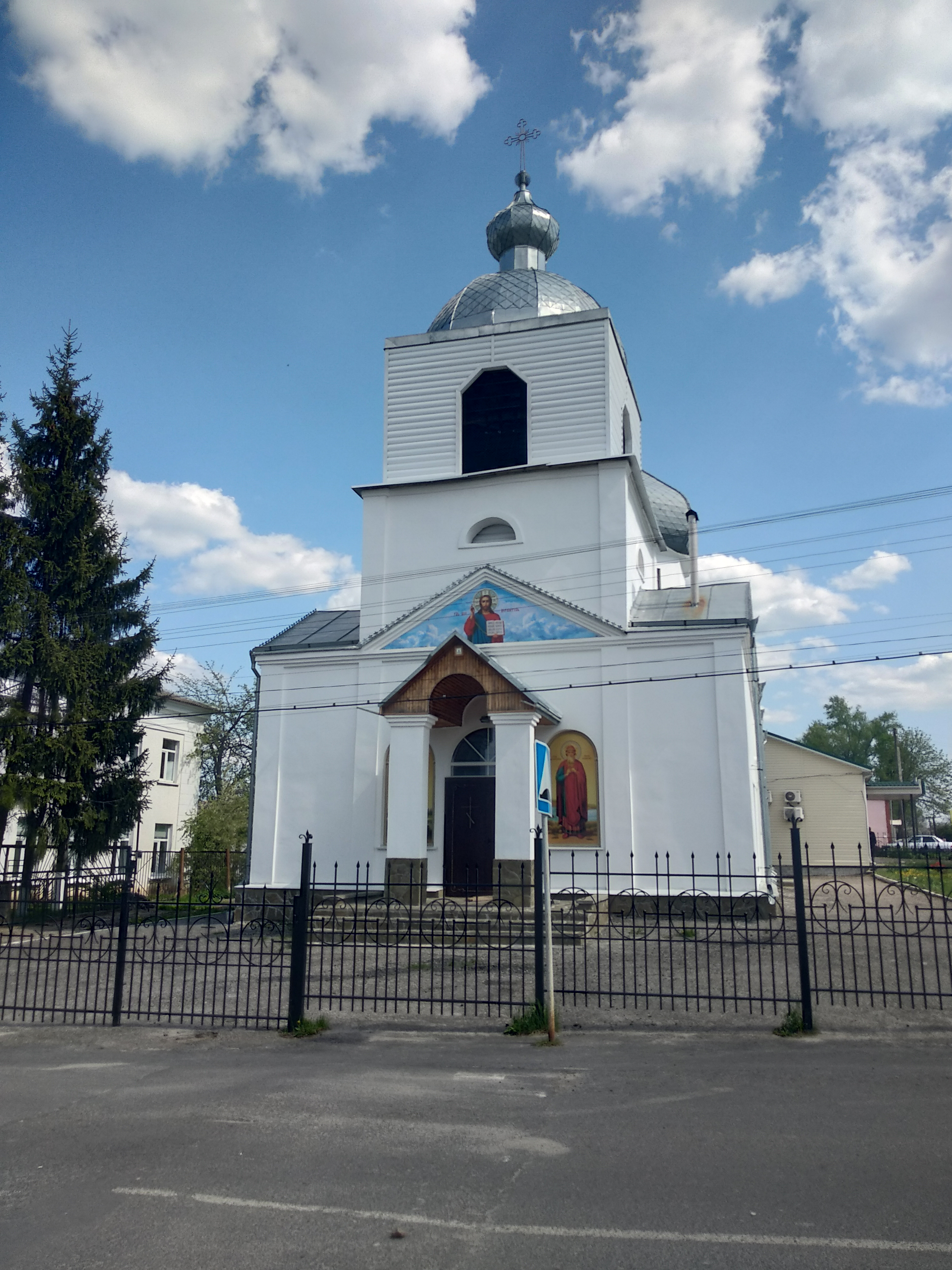 Церковь в Большом Солдатском селе